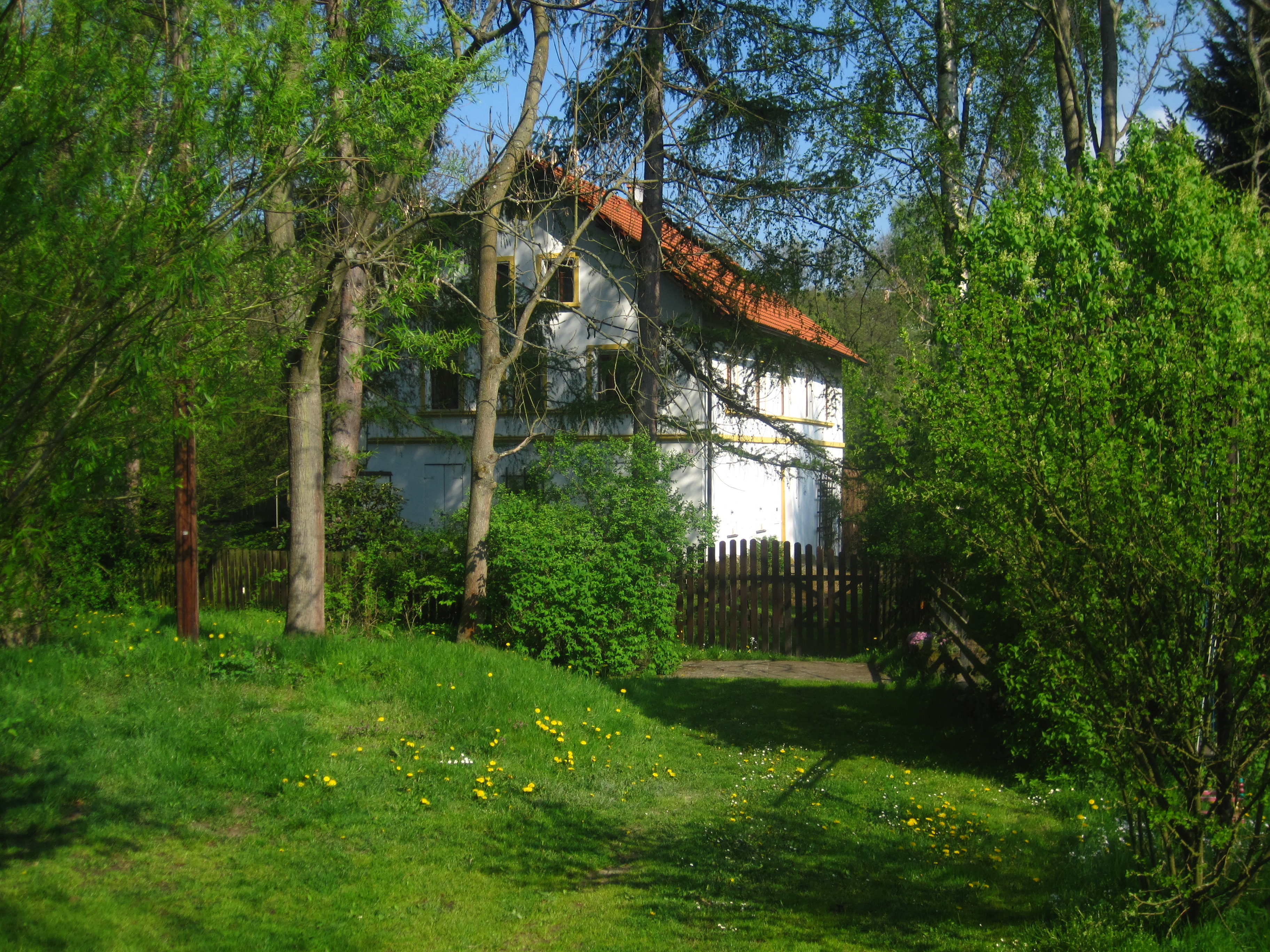 Novosedlo (Neugrund) - čp. 3